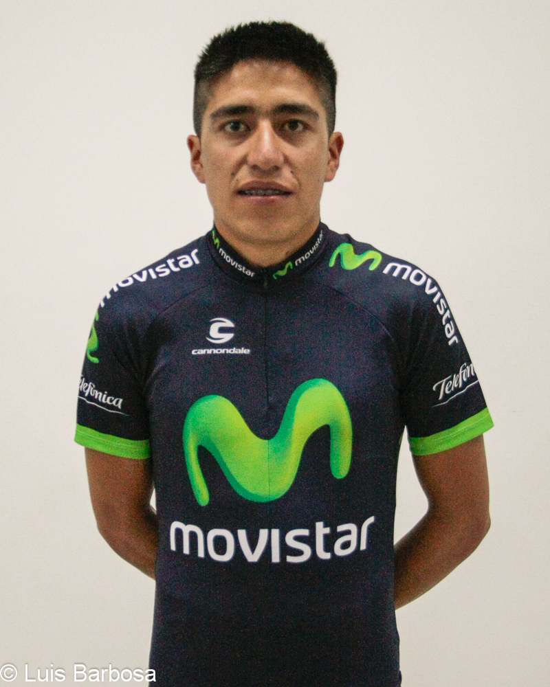 Photo officielle de Darwin Pantoja dans l'équipe Movistar Team America (saison 2013)